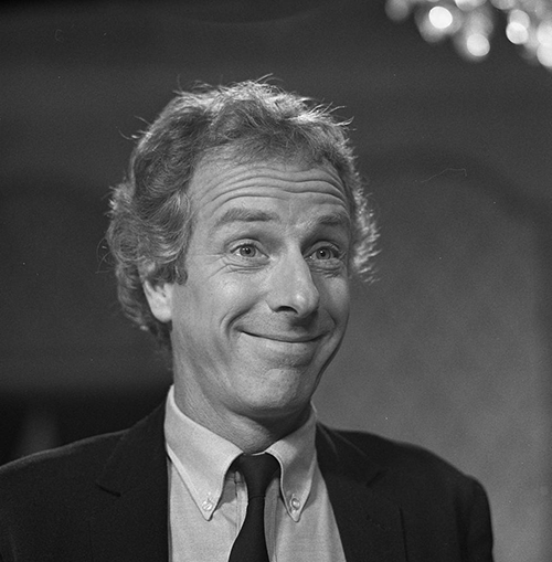 Ferd Hugas als Frits van Zanten in de Nederlandse televisieserie De lachende scheerkwast in 1981